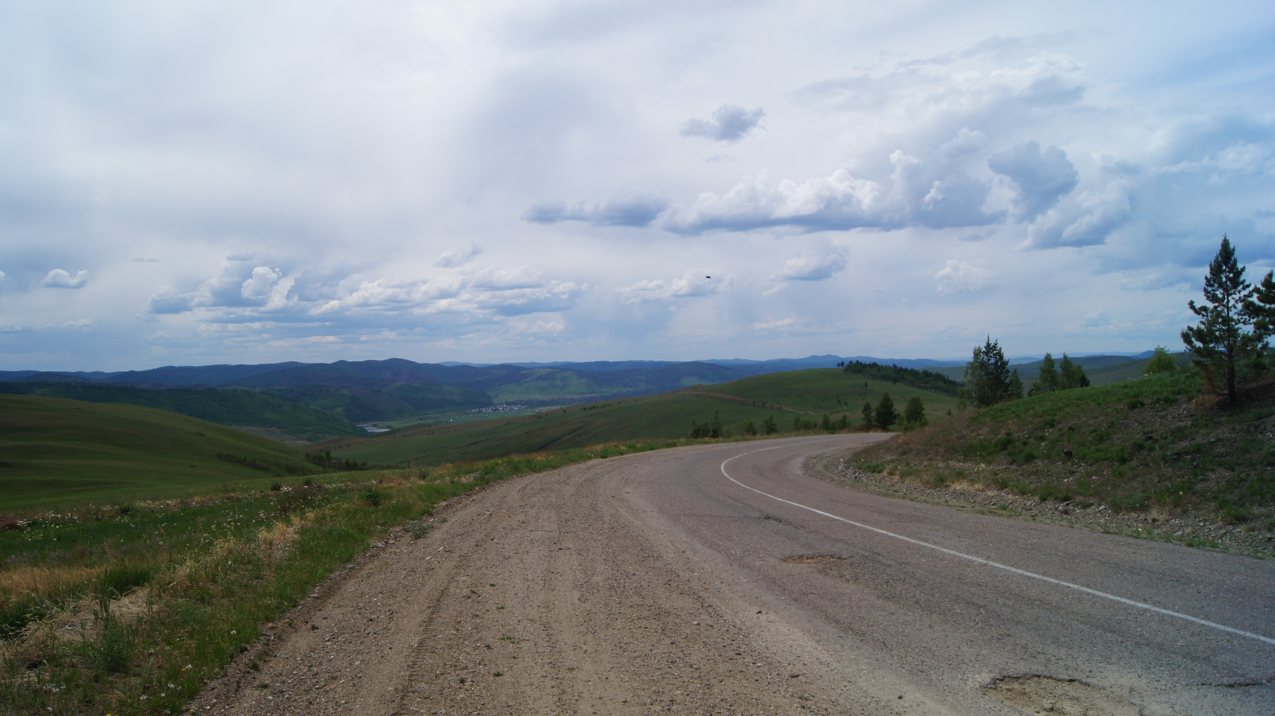 Вид на Атамановку, Карымский район